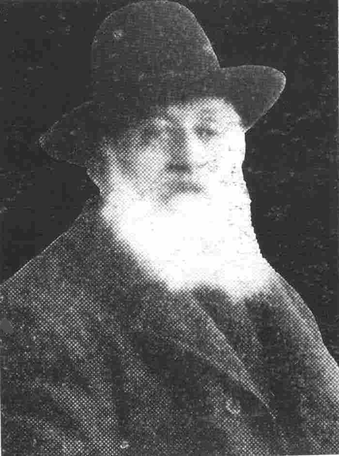 Emilio Casa (1819-1904), medico e storico parmigiano.